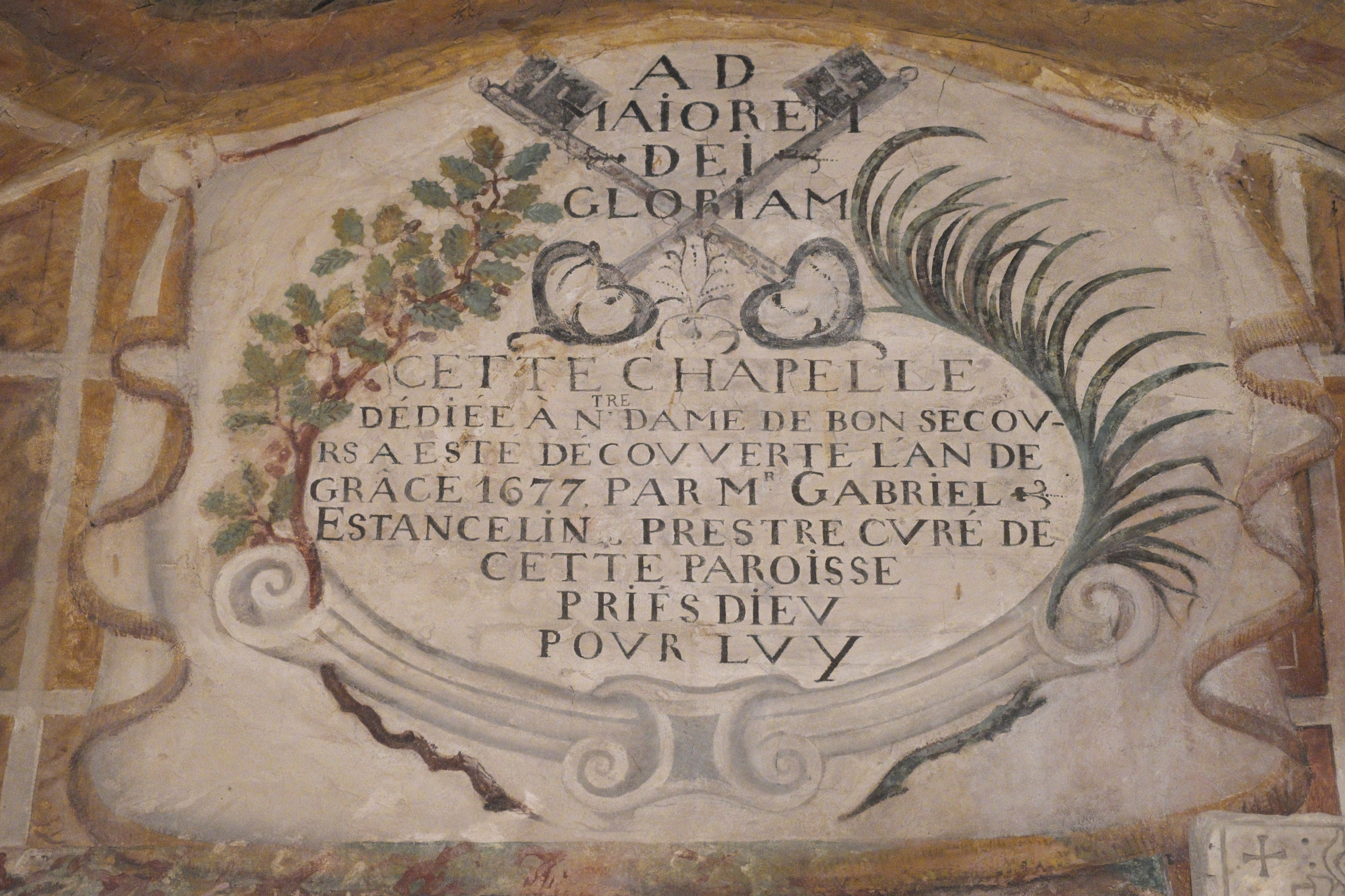 Katholische Pfarrkirche Notre-Dame-de-l'Assomption (Mariä Himmelfahrt) in Boigneville im Département Essonne (Île-de-France/Frankreich), Krypta